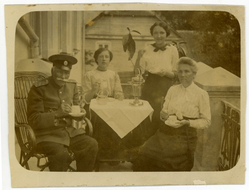 Paškevičių šeima (iš kairės: Augustinas Paškevičius, jo dukros Eugenija (Smilgienė, 1886–196?) ir Elena (Noreikienė, 1893–1939), antroji žmona Justina Dombrovska-Paškevičienė). Vilnius, ~1912 metai